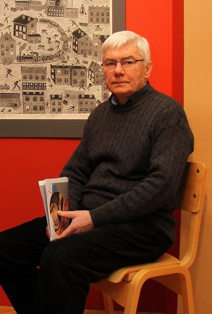 Jan Nowak (artysta) 2015 - photo: J.Pijarowski